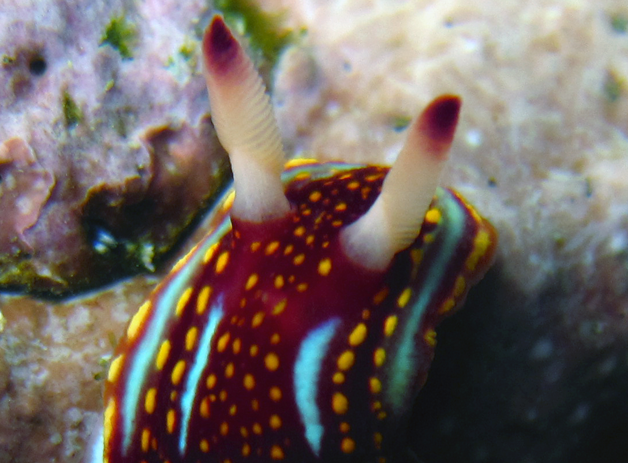 Felimida sphoni (sinonimia: Chromodoris sphoni (Ev. Marcus, 1971)